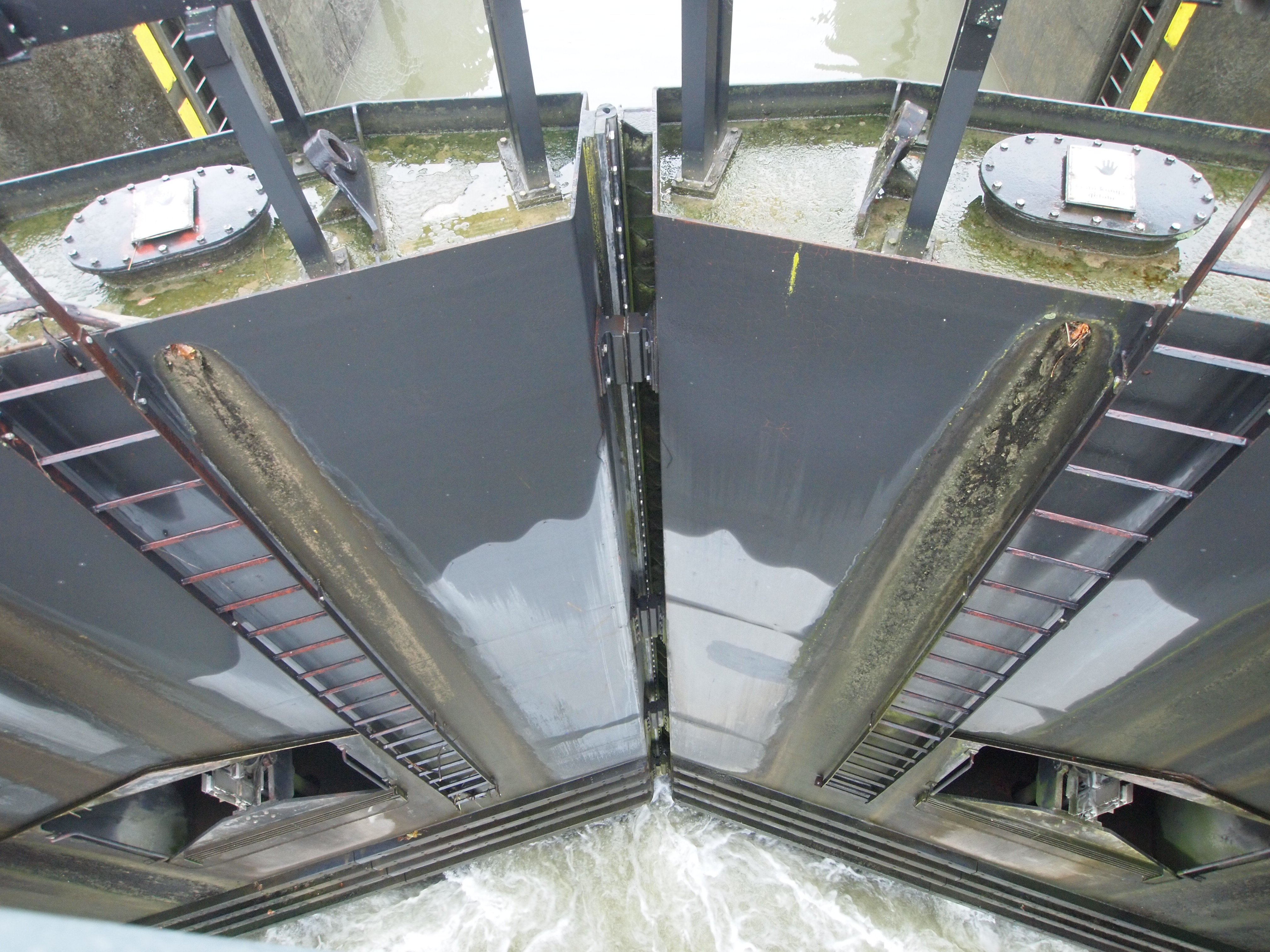 ein Schleusentor der Schleuse Schwabenheim